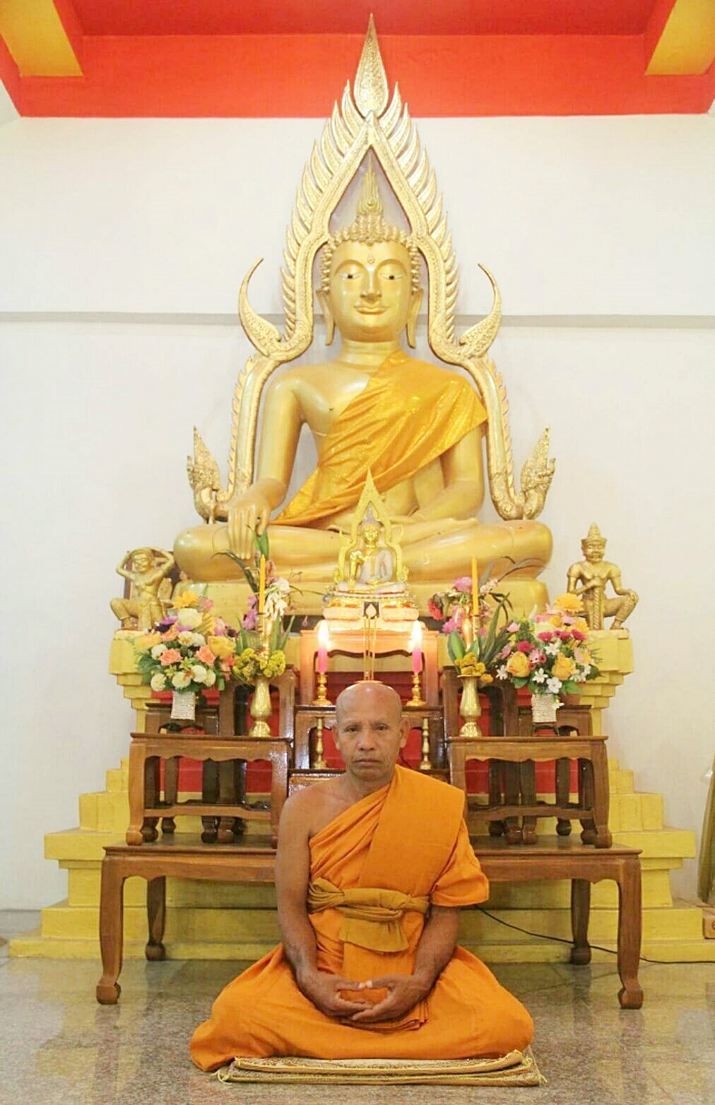 jaoawas